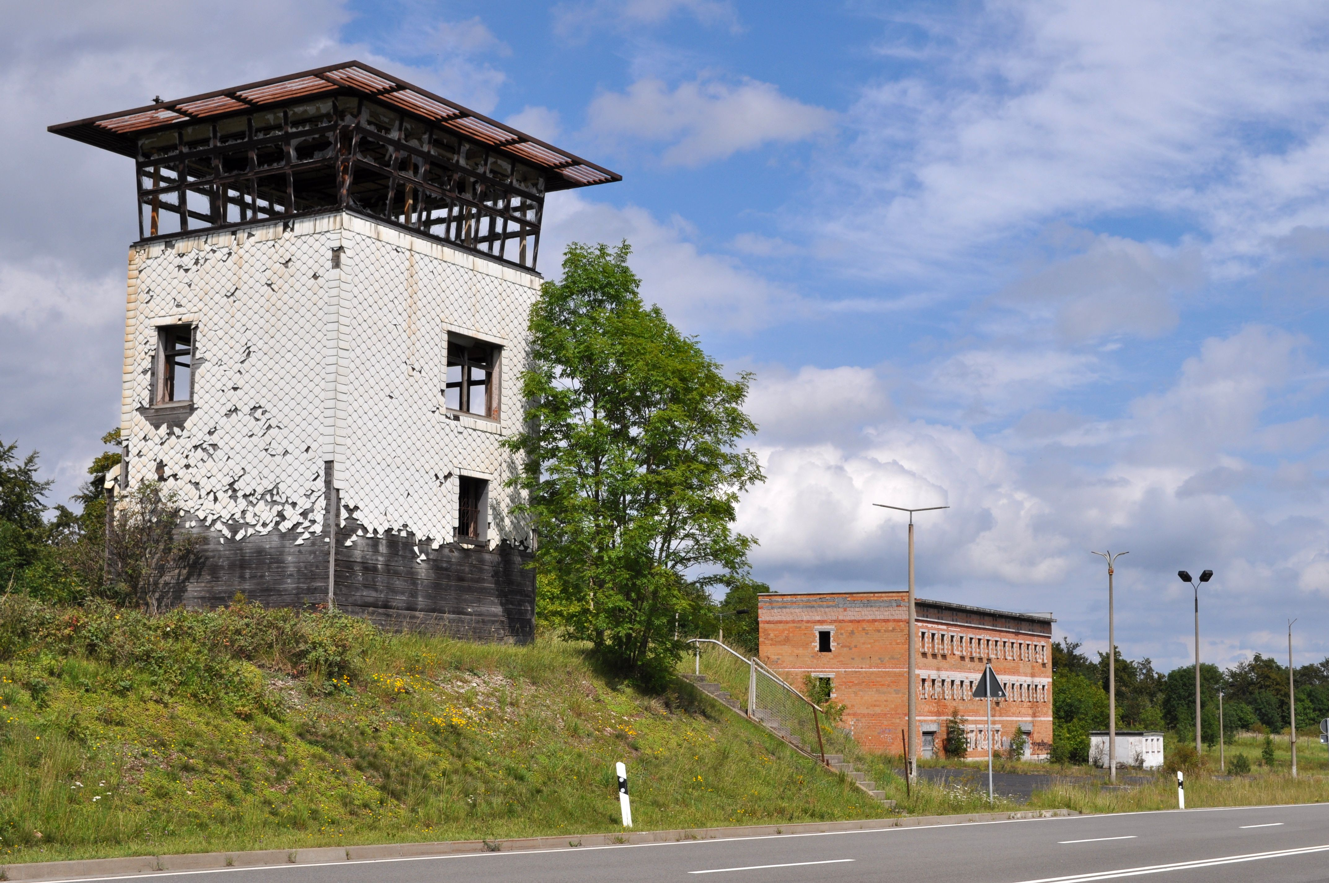 Ehem. Zonengrenzübergang Eußenhausen/Bayern nach Henneberg/Thüringen, Wachturm und ein unvollendeter Backsteinbau für geplante Büroräume der Passkontrolle, des Zolls und der Grenztruppen